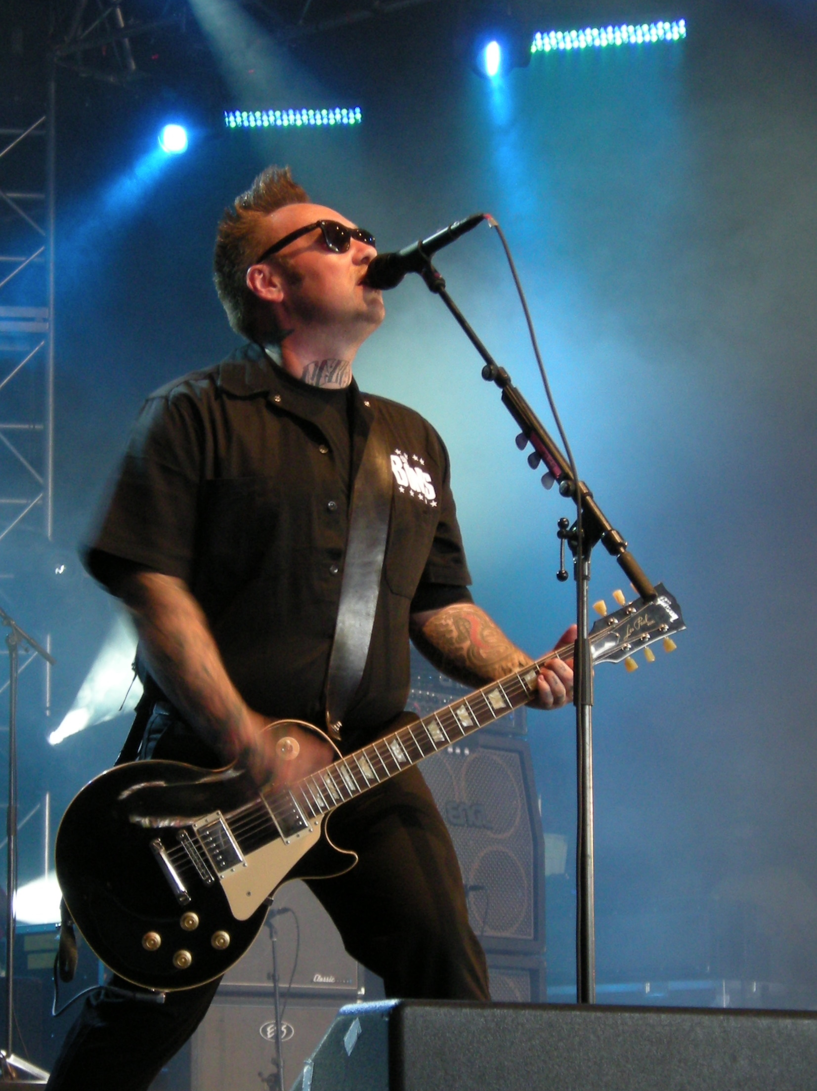 Peace and Love 2010. The Bones spelar på Athena.